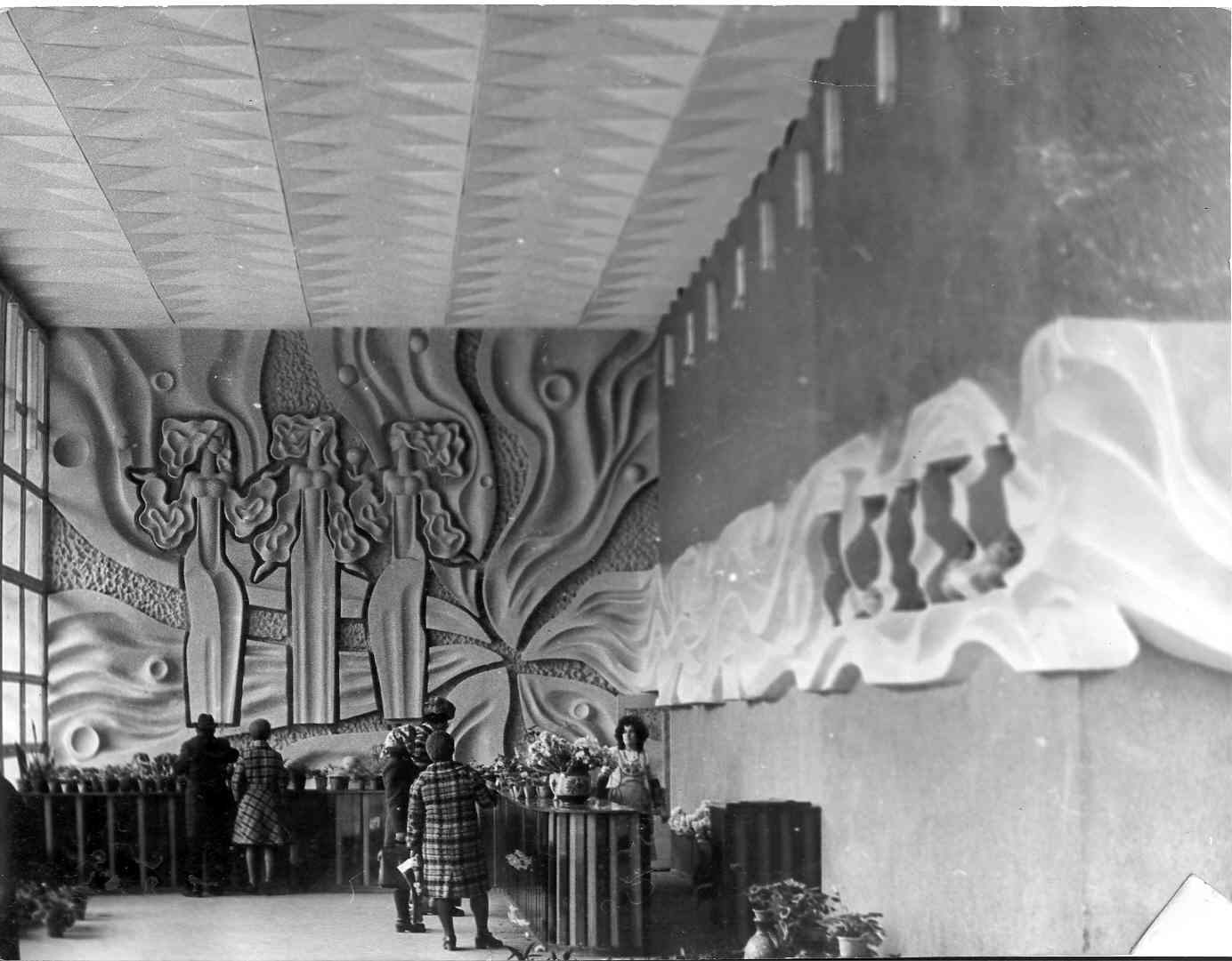 В Доме природы, г. Кривой Рог.